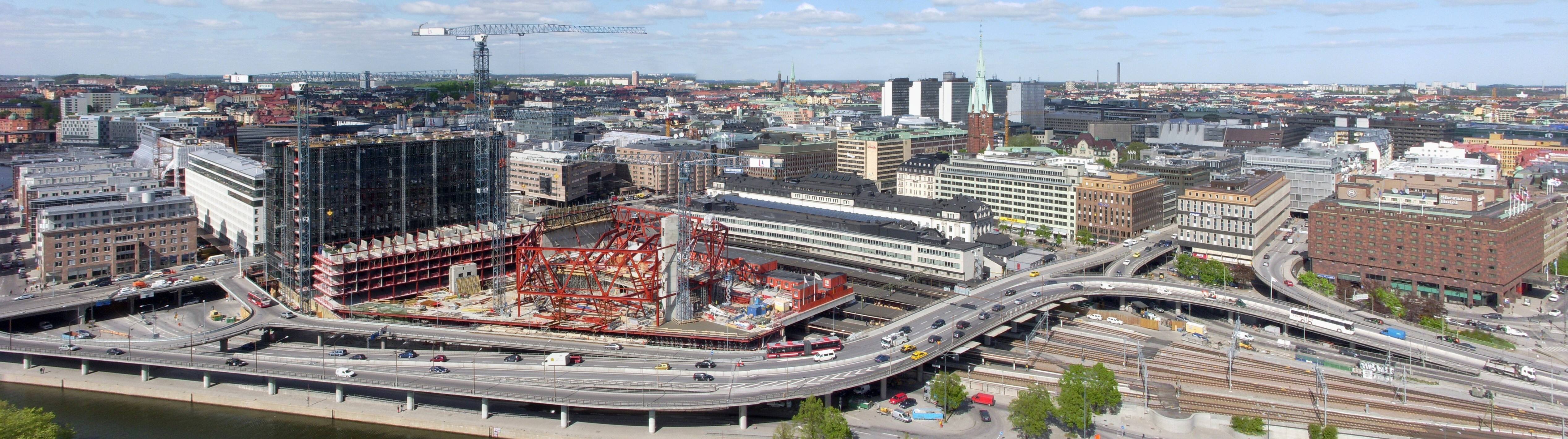 Panorama från Stadshustornet över Norrmalm